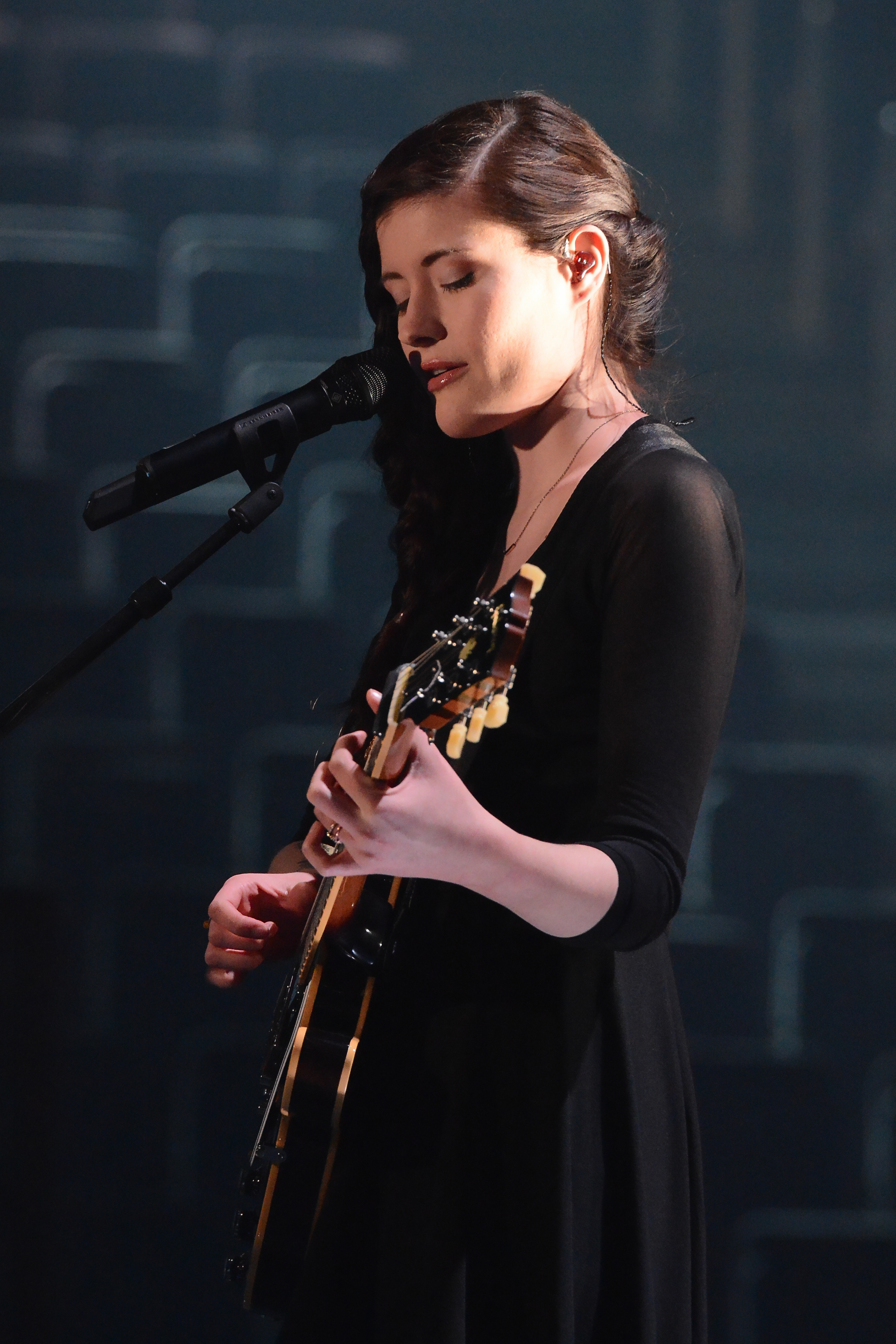 Madeline Juno bei Unser Song für Dänemark 2014 in Köln.